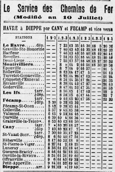 Fiche horaire du 10 juillet 1915 de la ligne du Havre à Dieppe, publiée le 15 juillet 1915 dans Le Petit Havre (journal).